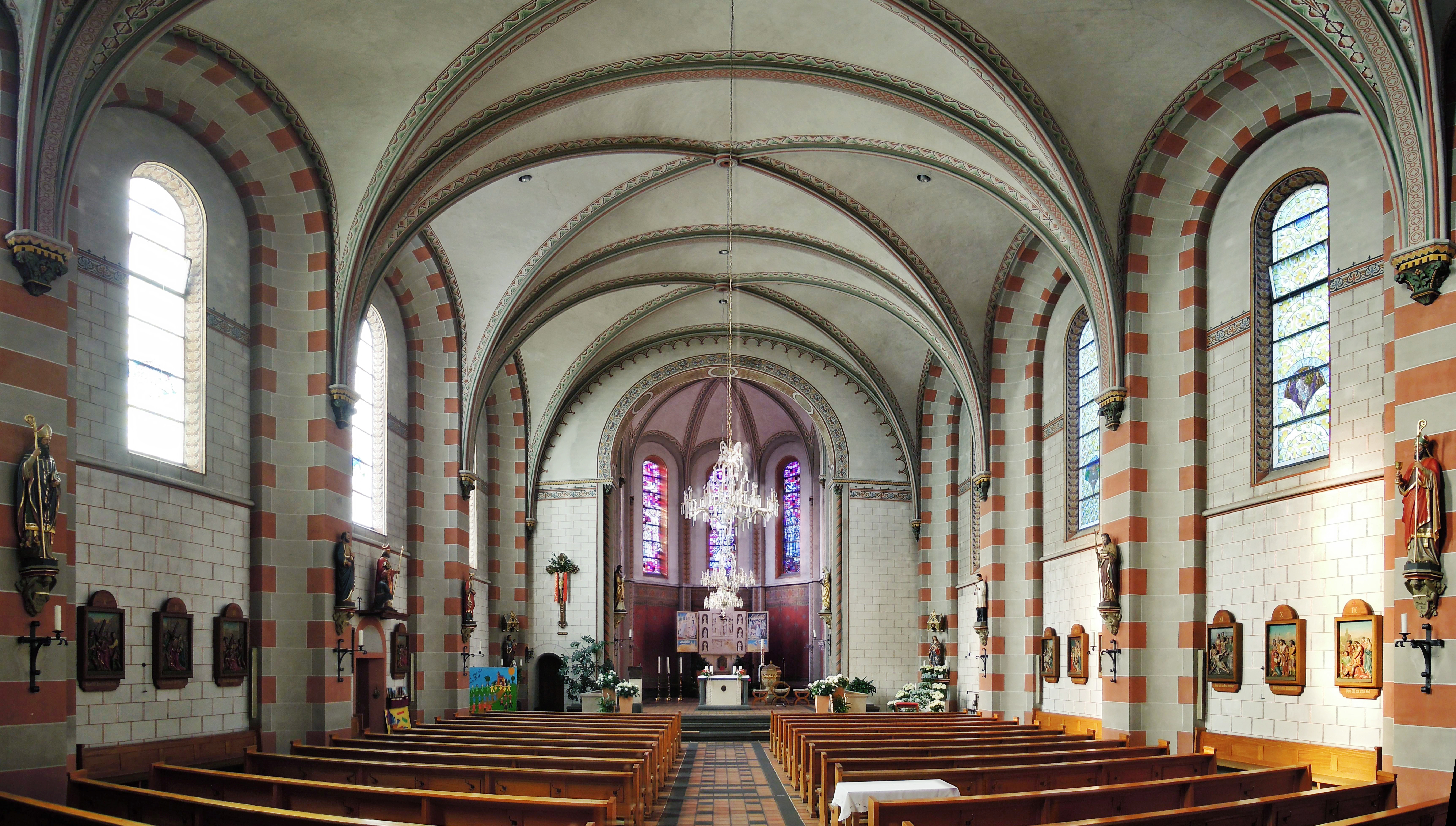 Katholische Pfarrkirche St. Mariae Heimsuchung in Wadgassen